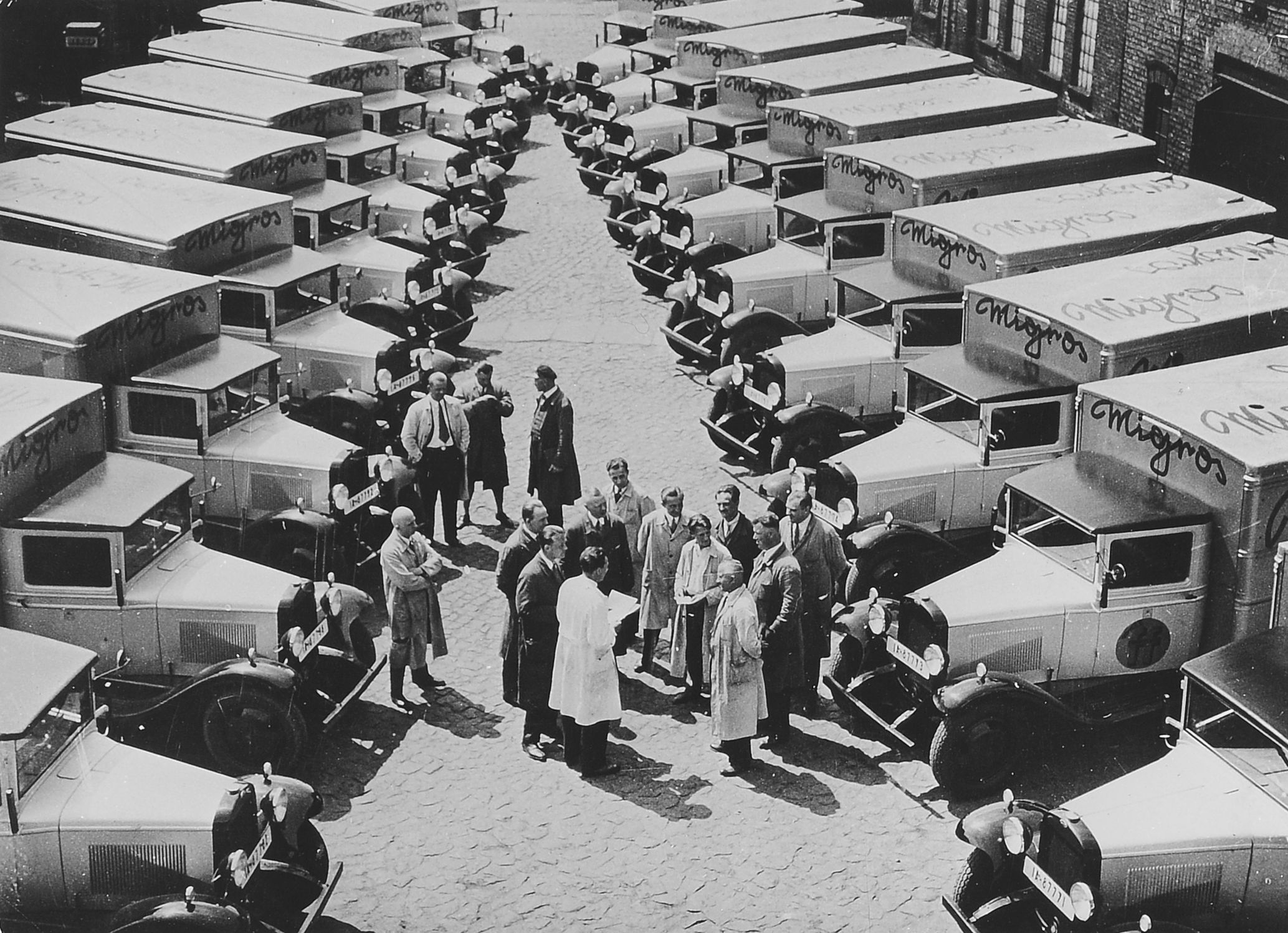 Migros Berlin: diverse parkierte Verkaufswagen mit Personal